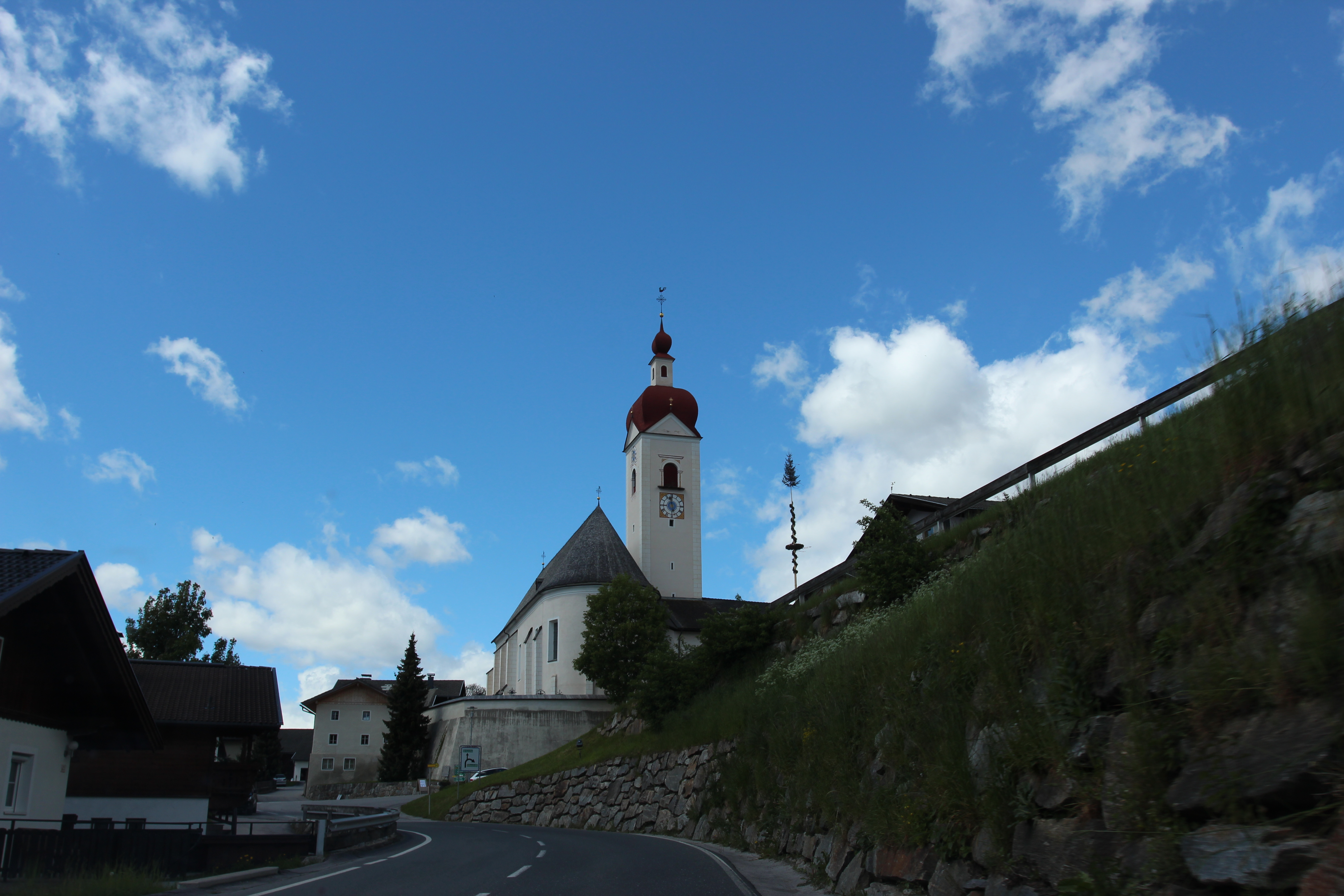 Kath. Pfarrkirche Hl. Dreifaltigkeit, Gemeinde Assling, Osttirol, Österreich.